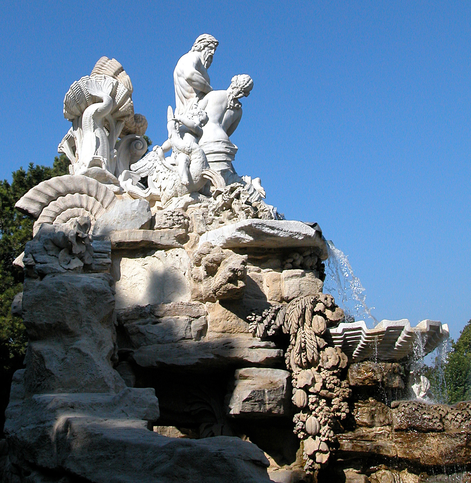 Der Neptunbrunnen im Schönbrunner Schlosspark (cropped version).